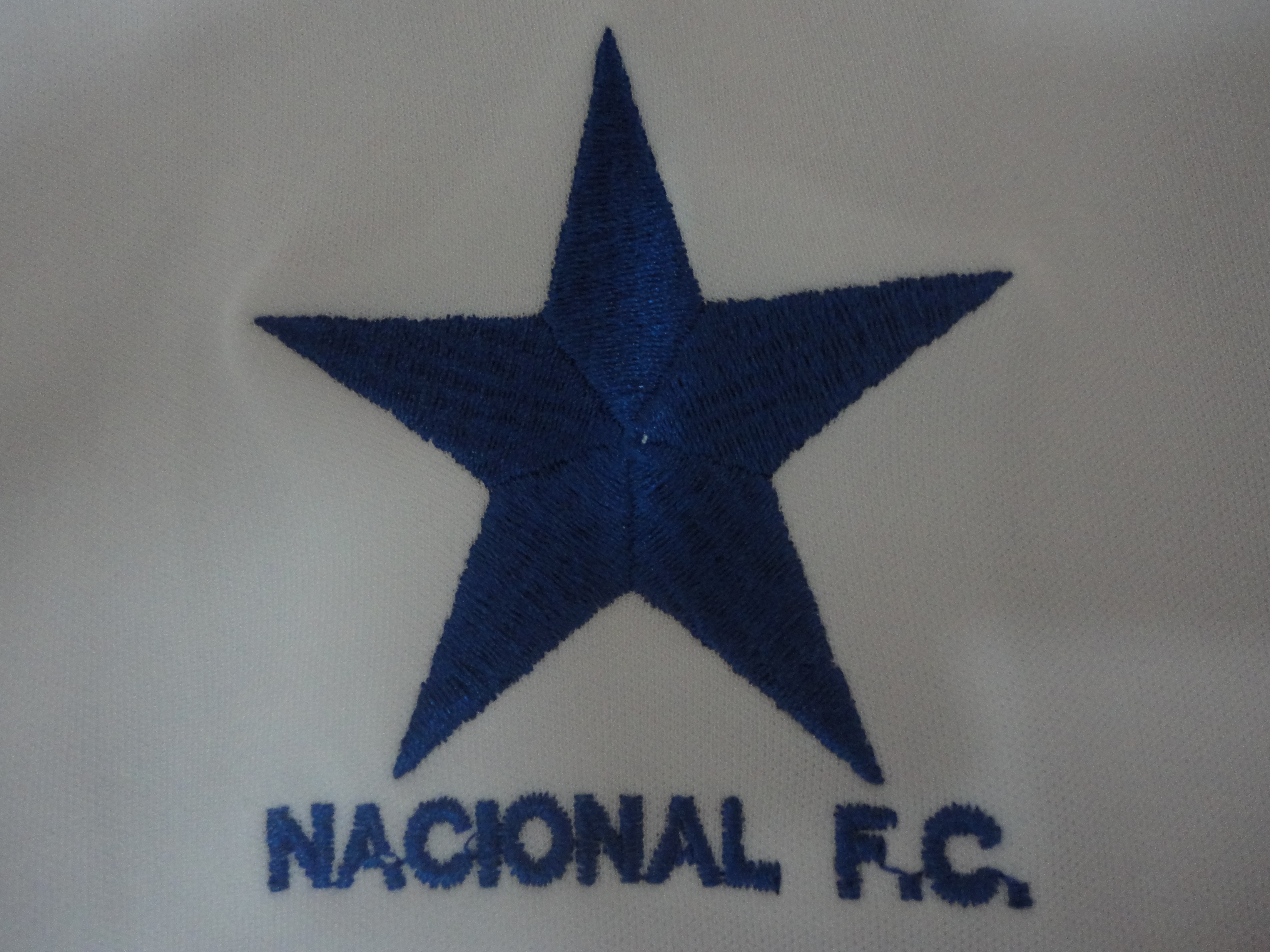 Estrela azul, tradicionalmente estampado na camisa branca do Naça-AM. Fotografia feita por mim.